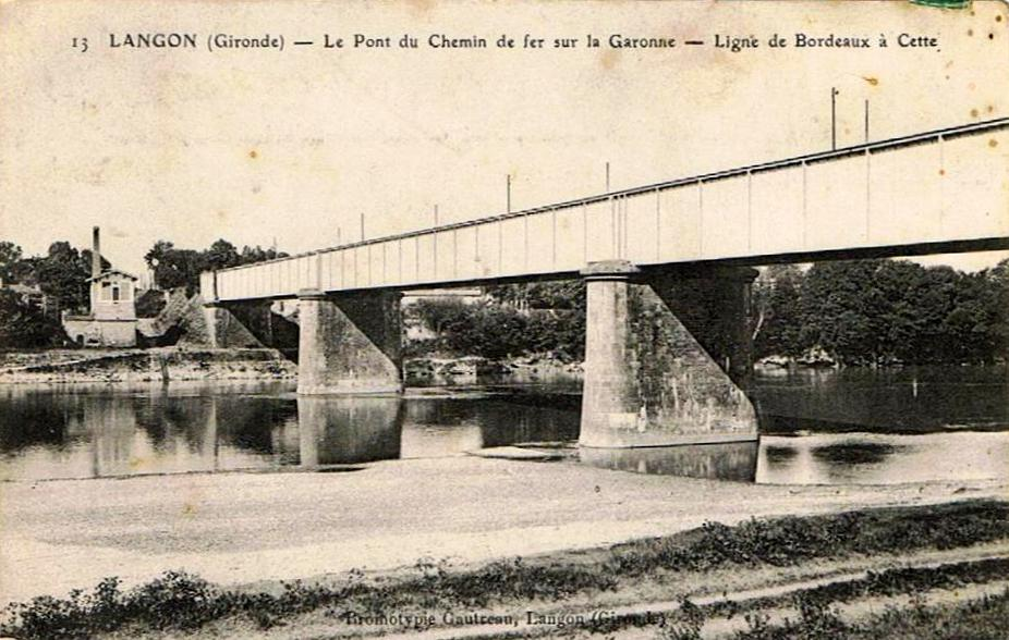 Ponts sur la Garonne